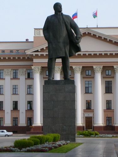 Памятник В. И. Ленину на Центральной площади Тюмени